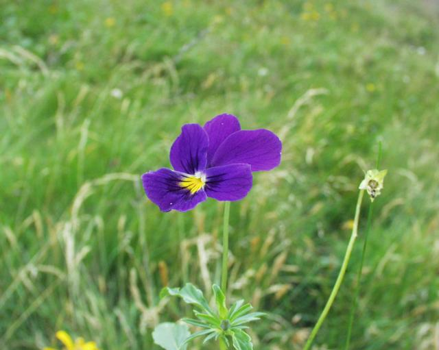 (en) Mountain Pansy (Viola lutea subsp.lutea), a photography originating of the internet site The accord of the autor, H. Brisse, is here. (fr) Pensée jaune (Viola lutea subsp.lutea), une photographie issue du site internet L'accord de l'auteur, H. Brisse, se situe ici.